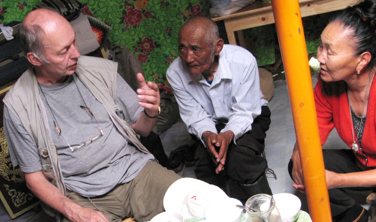 Kai Ehlers beim Gespräch in einer Jurte in der Mongolei, Nähe Karakorum